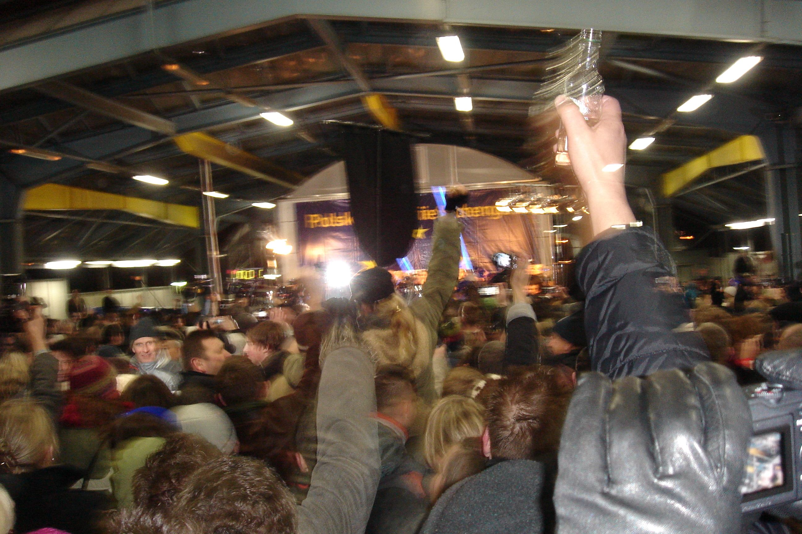 Przejście graniczne Słubice_Frankfurt n/Odrą 21.12.2007 r. - Polska w strefie Schengen. Wybuch radości tłumów zebranych na moście granicznym w momencie wejścia Polski do strefy i zniesienia kontroli na granicy Polsko-Niemieckiej.